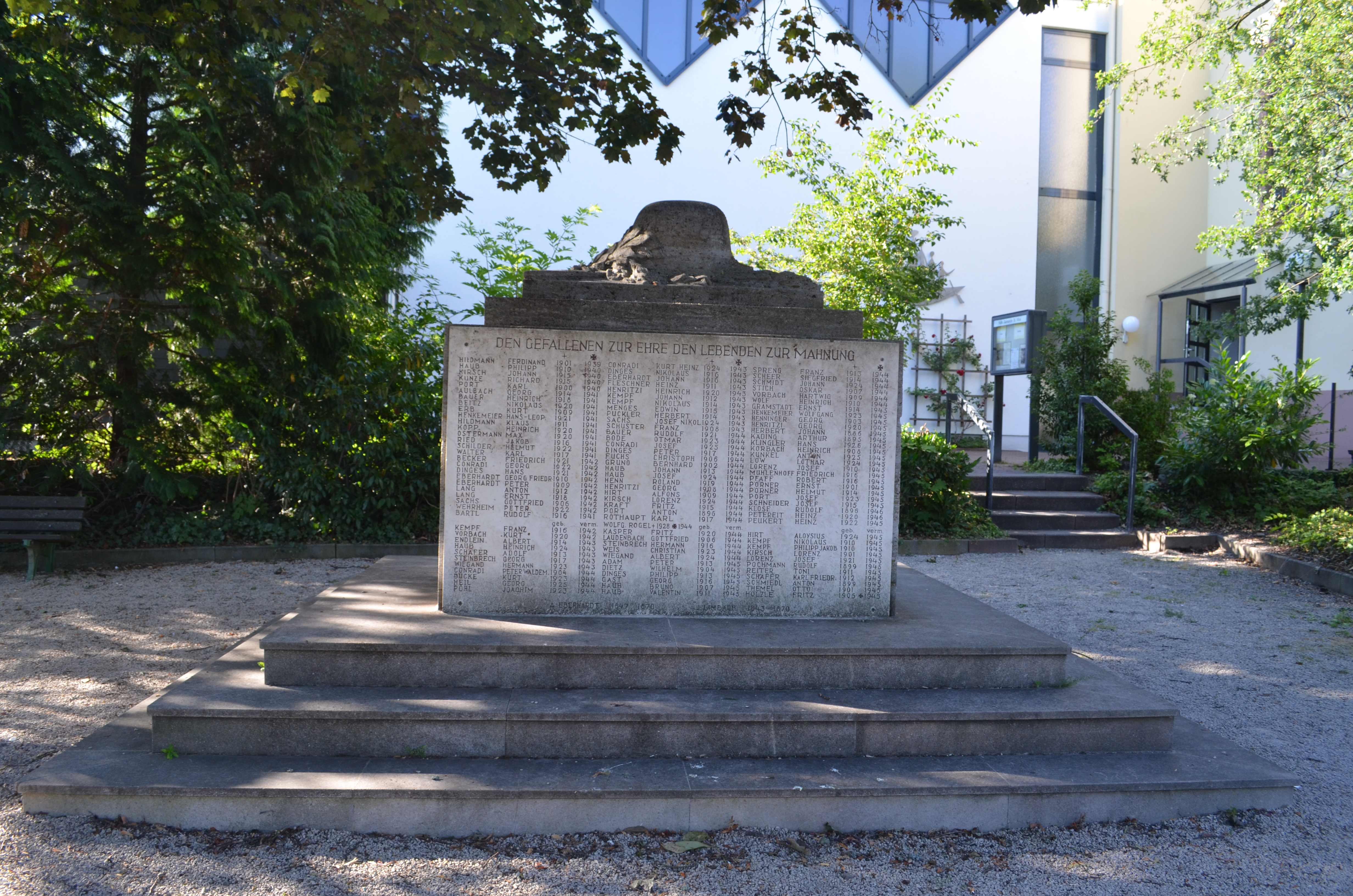 Oberhöchstadt, Kriegerdenkmal vor der Kirche